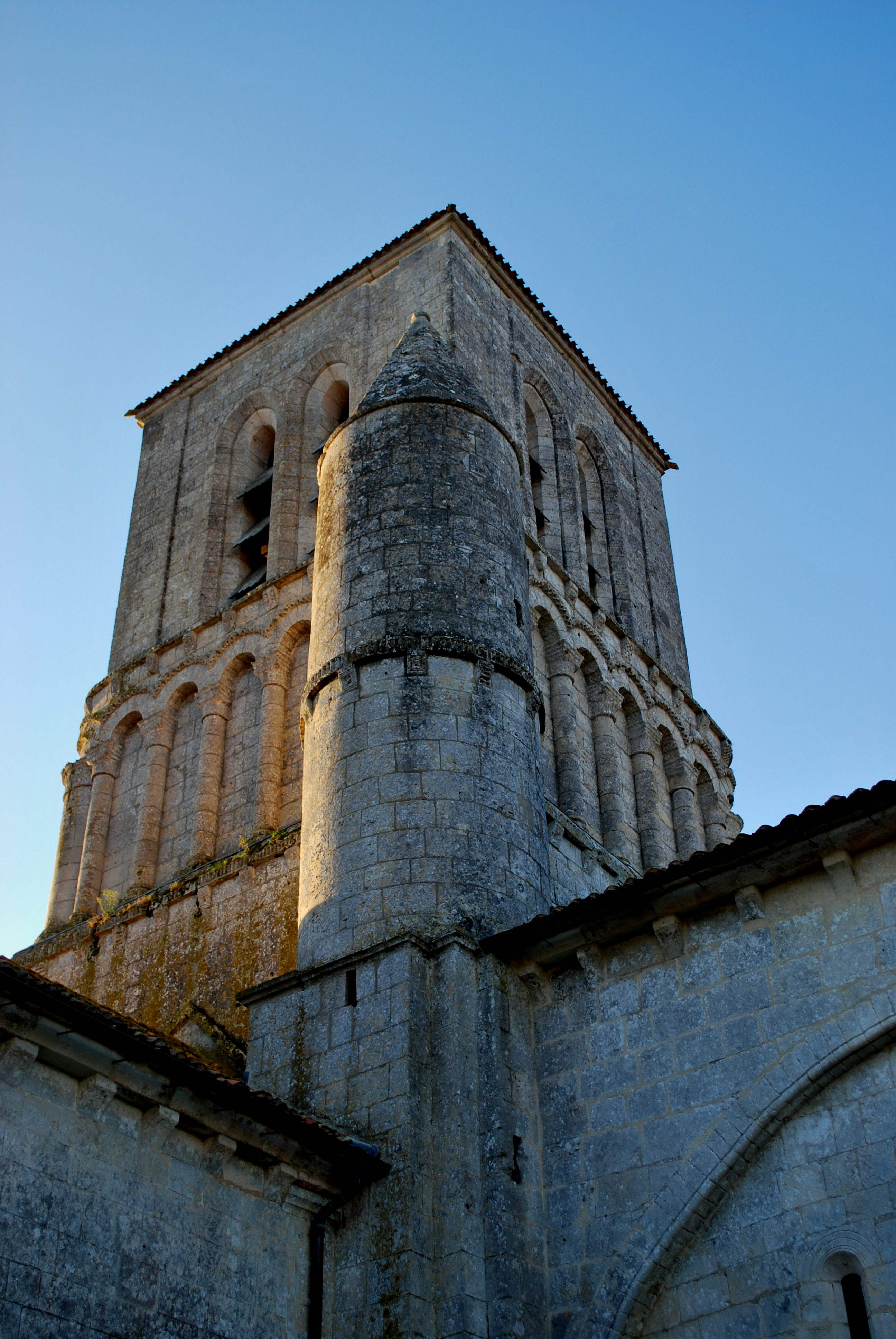 Corme-Ecluse église